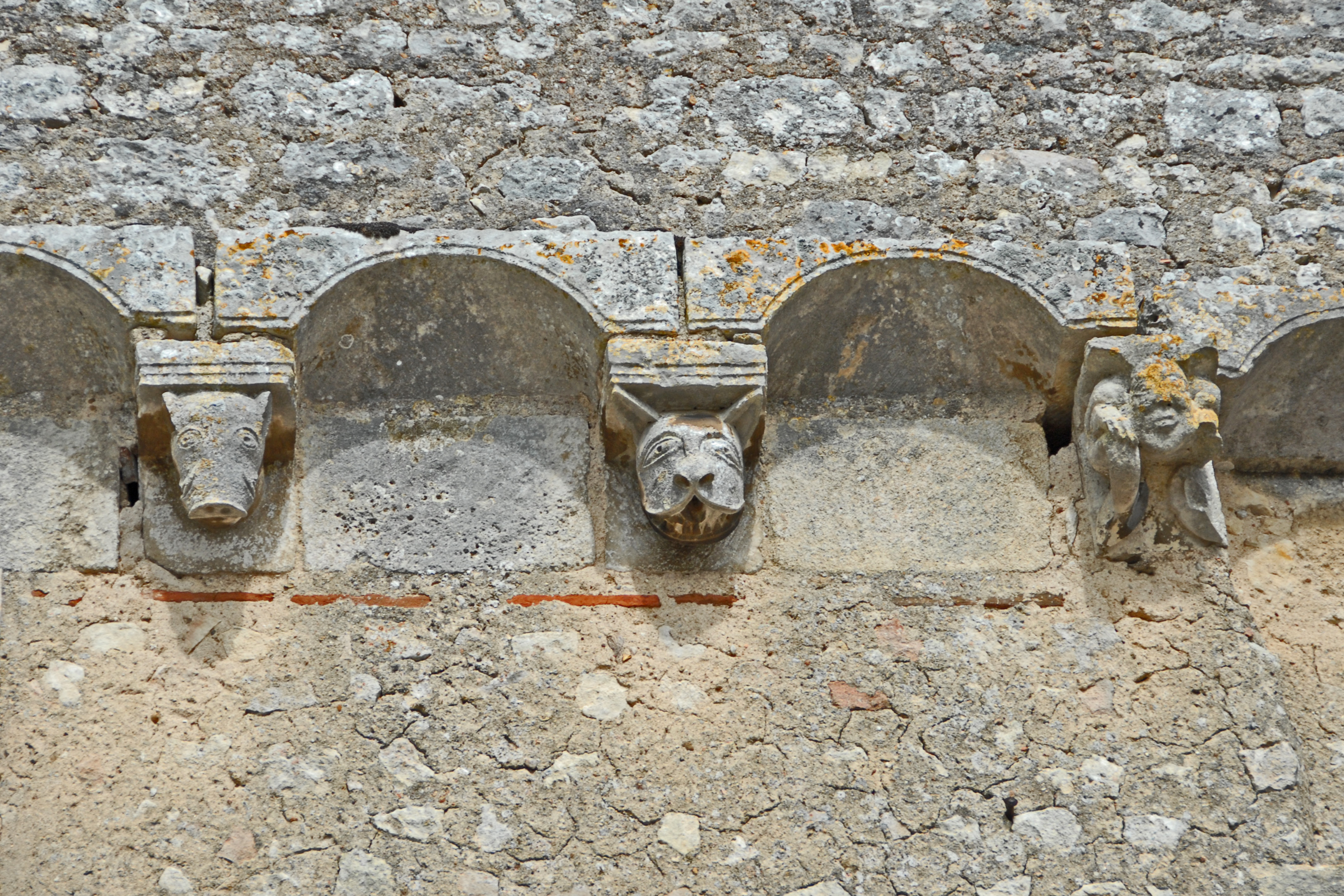 Civaux, Kirche, Fassade, Kragsteine